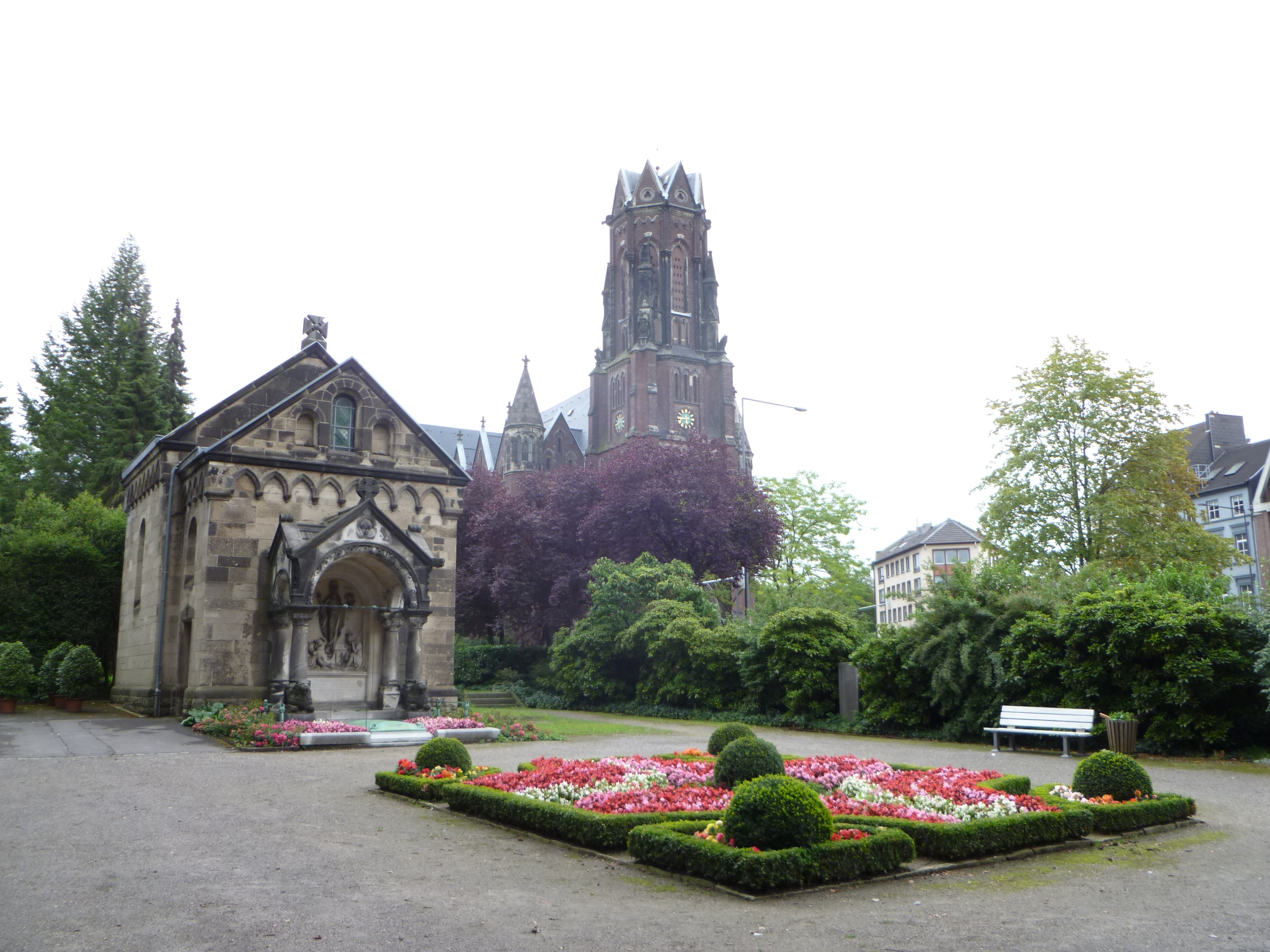 Eingangsbereich Ostfriedhof Aachen mit der Grabeskirche St. Josef im Hintergrund